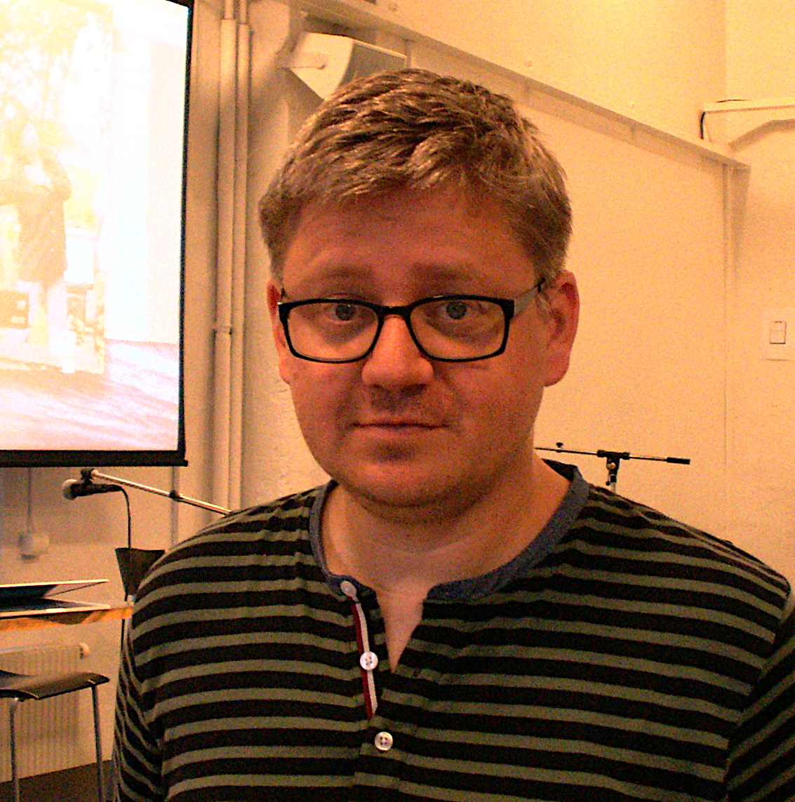 Leif Holmstrand vid en konstnärspresentation i Litteraturhuset i Göteborg, oktober 2014.